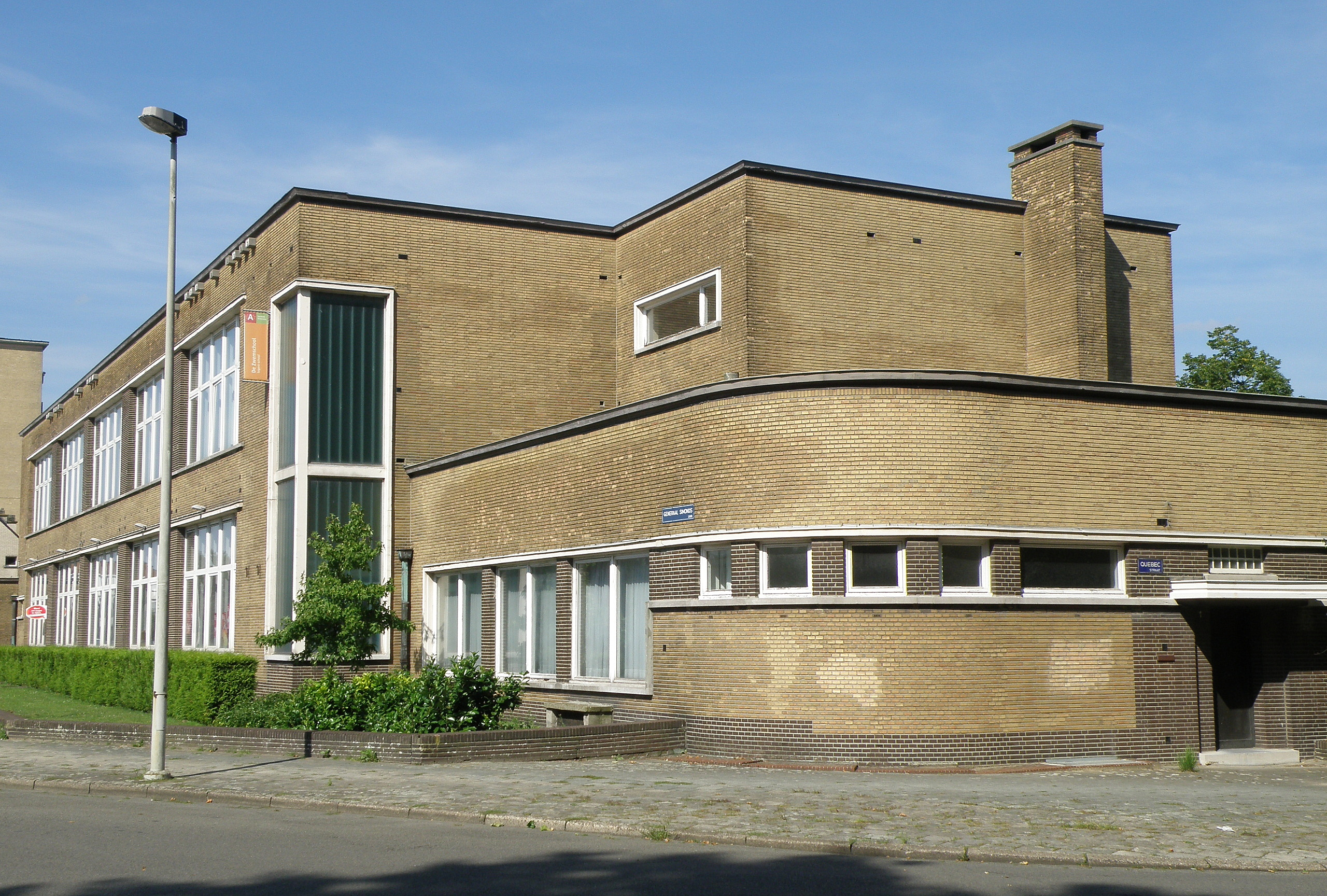 Antwerpen, wijk Luchtbal. Schoolcomplex aan de Quebecstraat (hoofdingang), ontwerp van stadsarchit. Emiel Van Averbeke, anno 1935. Hoek Gen. Simondslaan/Quebecstraat.